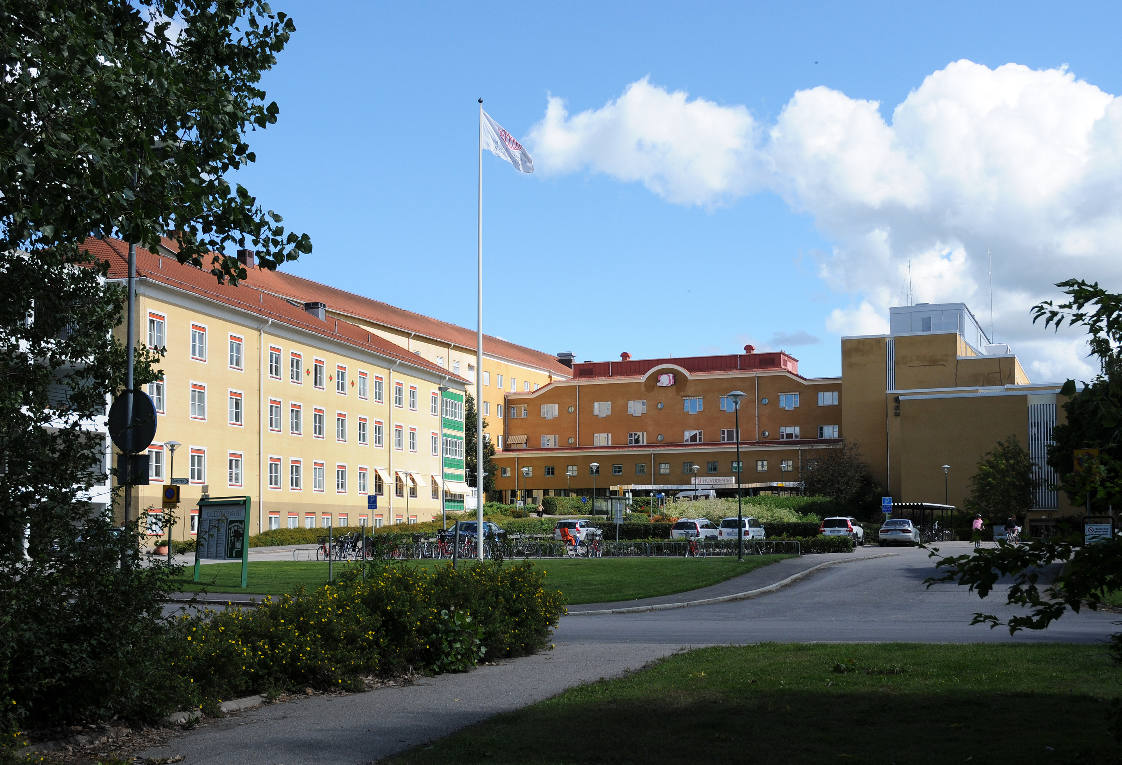 Kulbergska sjukhuset i Katrineholm